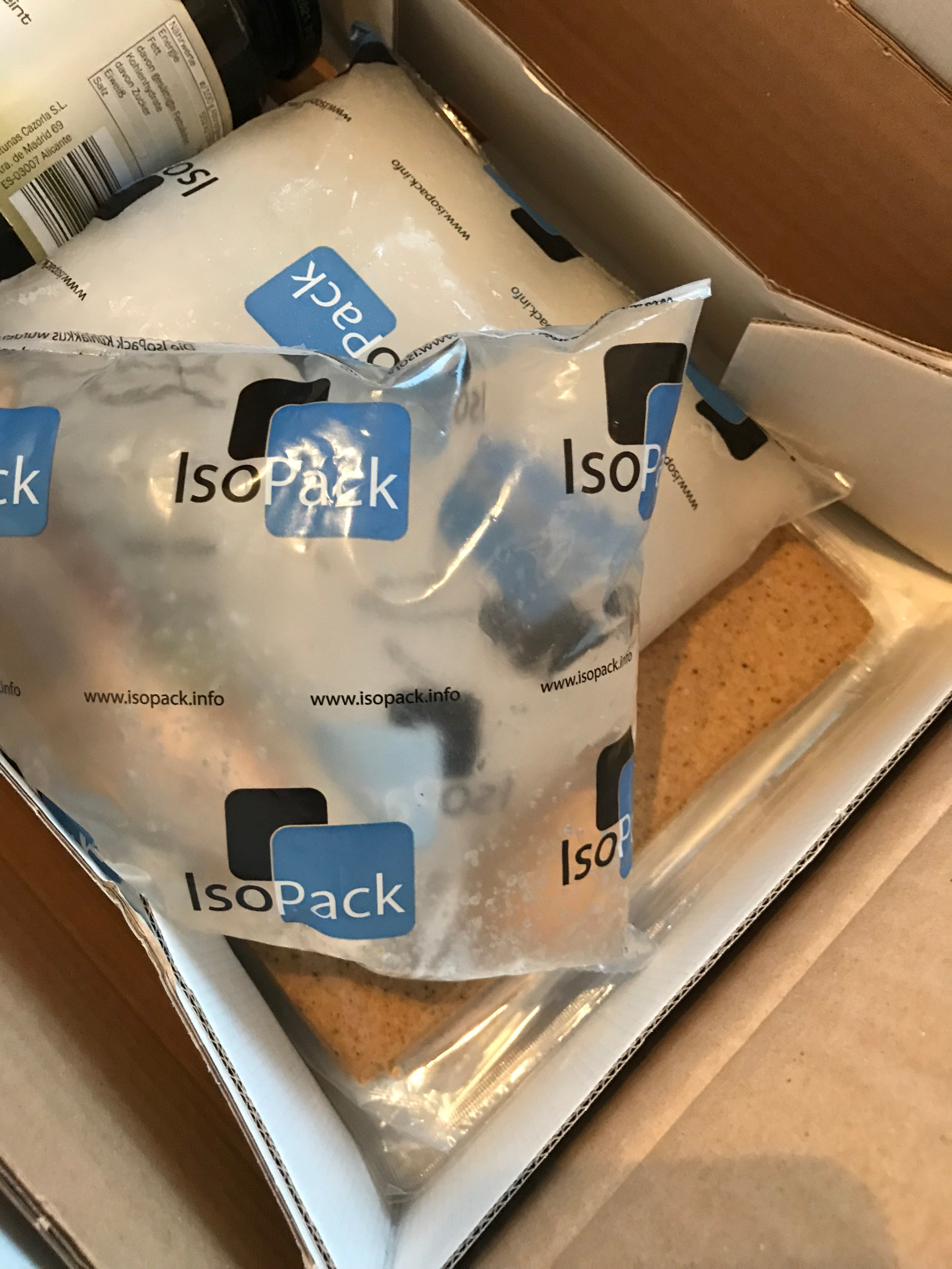 Paket mit Lebensmitteln und Einweg-Kühlakkus.